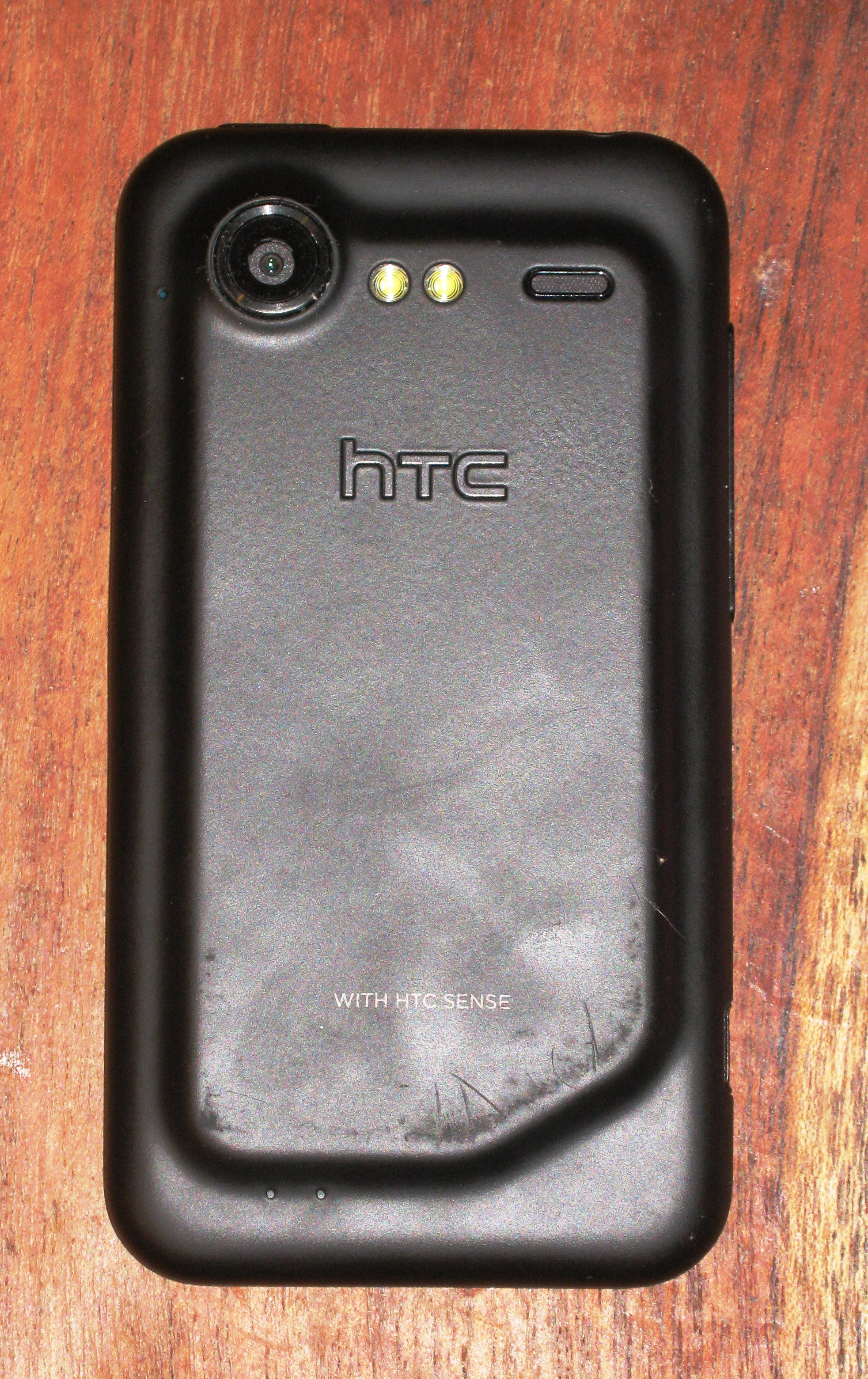 HTC Incredible S mobiltelefon